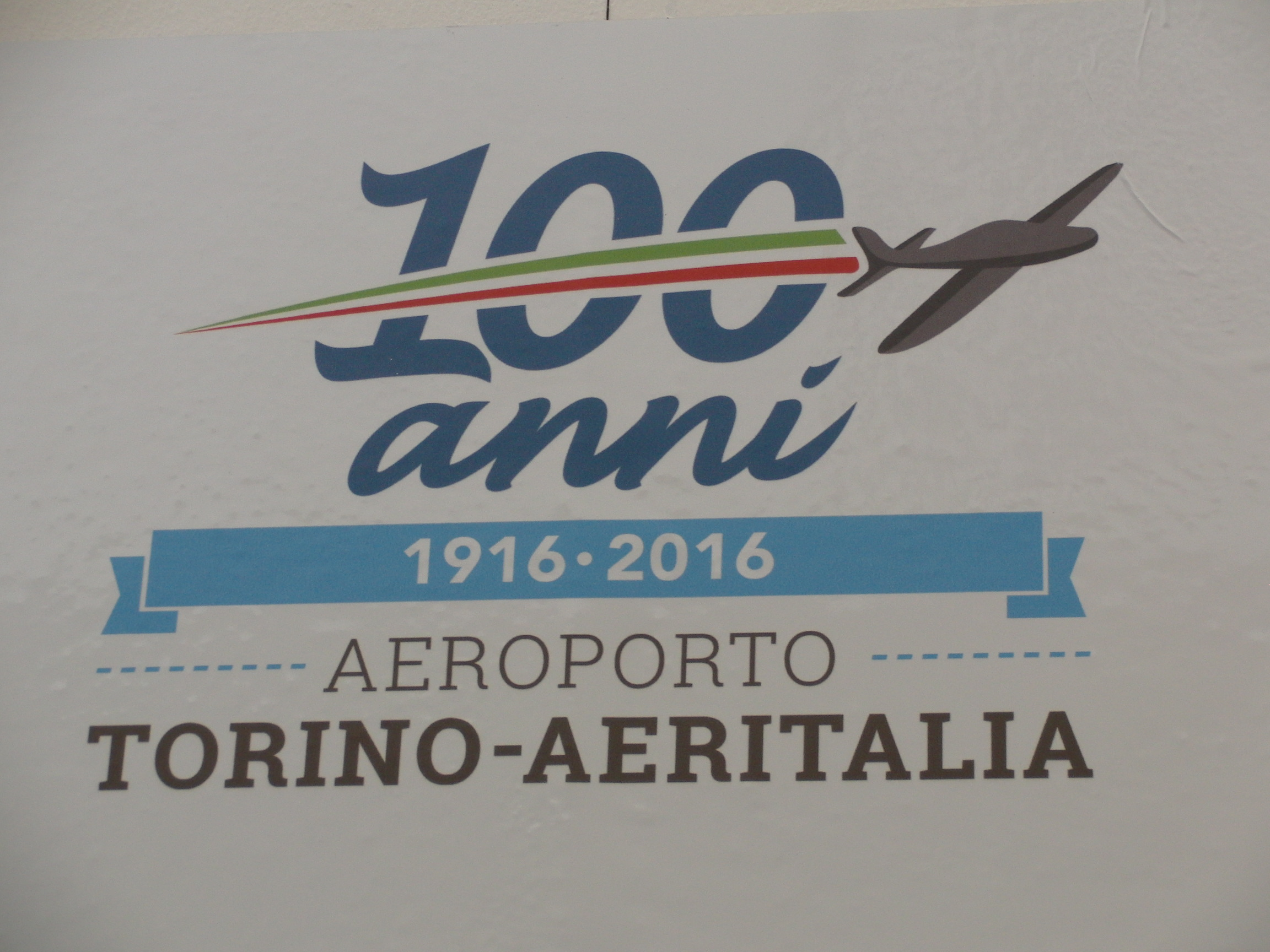 Manifesto del Centenario Aeroporto Torino Aeritalia 2016